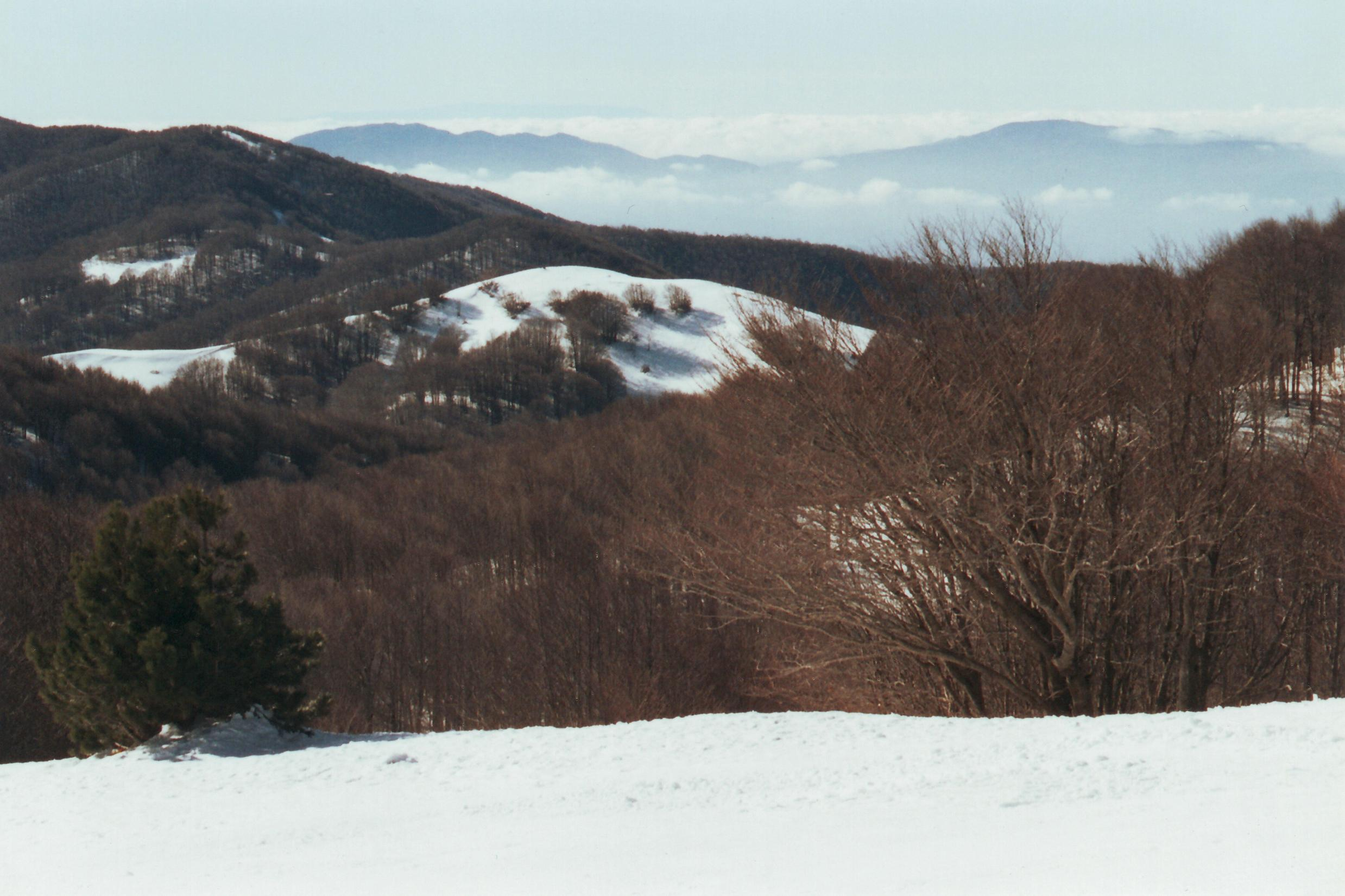 Autore della foto: Bruno Francesco Pileggi